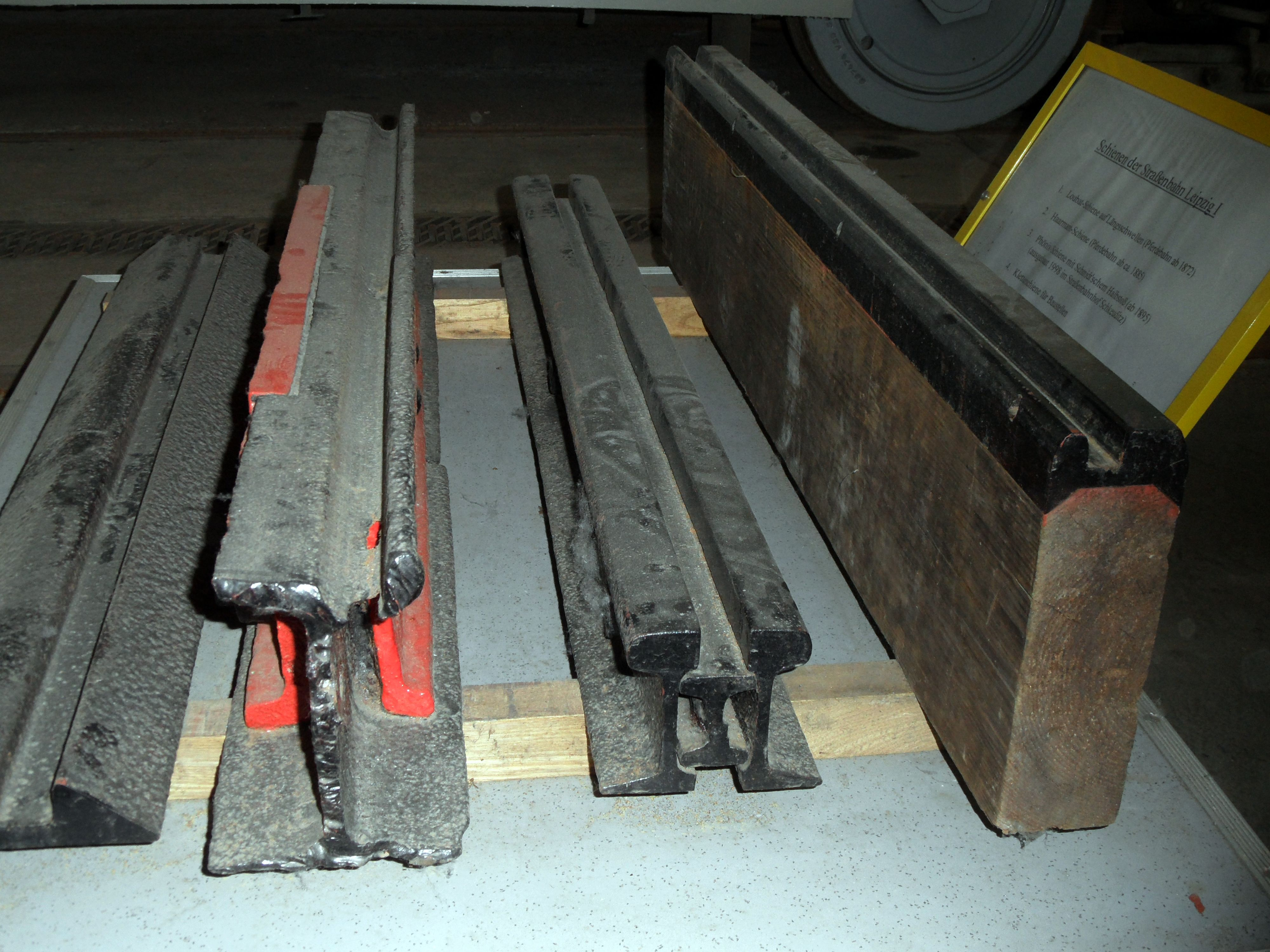 Im Leipziger Straßenbahnnetz verwendete Schienenprofile. Ganz rechts der Langschwellenoberbau der Bauart Loubat (oder Lonbad) von 1872, die hohen Langschwellen lagen auf leichten Querschwellen, waren aber nicht durch Spurhalter verbunden. Die Folge war eine durchschnittliche Spurerweiterung auf 1460 mm. In der Mitte die mehrteilige Bauart Haarmann, eingebaut ab 1885. Links einteilige Phoenix-Rillenschiene von 1895 mit »Schmidtschem Halbstoß«, einer Auflauflaschenbauart. Wegen der schmalen Radreifen musste der Schienenkopf im Stoßbereich auf der Außenseite um ein Drittel abgefräst werden. Die einteiligen Rillenschienen wurden für den elektrischen Betrieb eingebaut. Ganz links Kletterschiene für Baustellen.